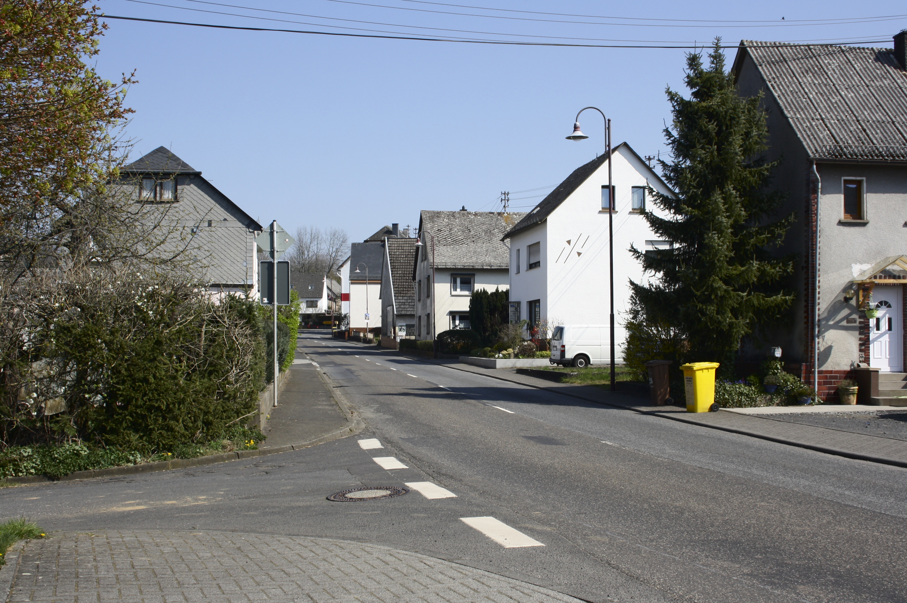 Oberahr, Westerwaldkreis, Rheinland-Pfalz, Deutschland